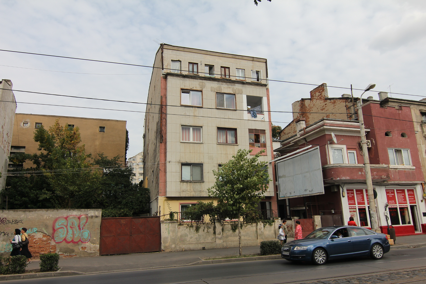 Casă pe Dudești